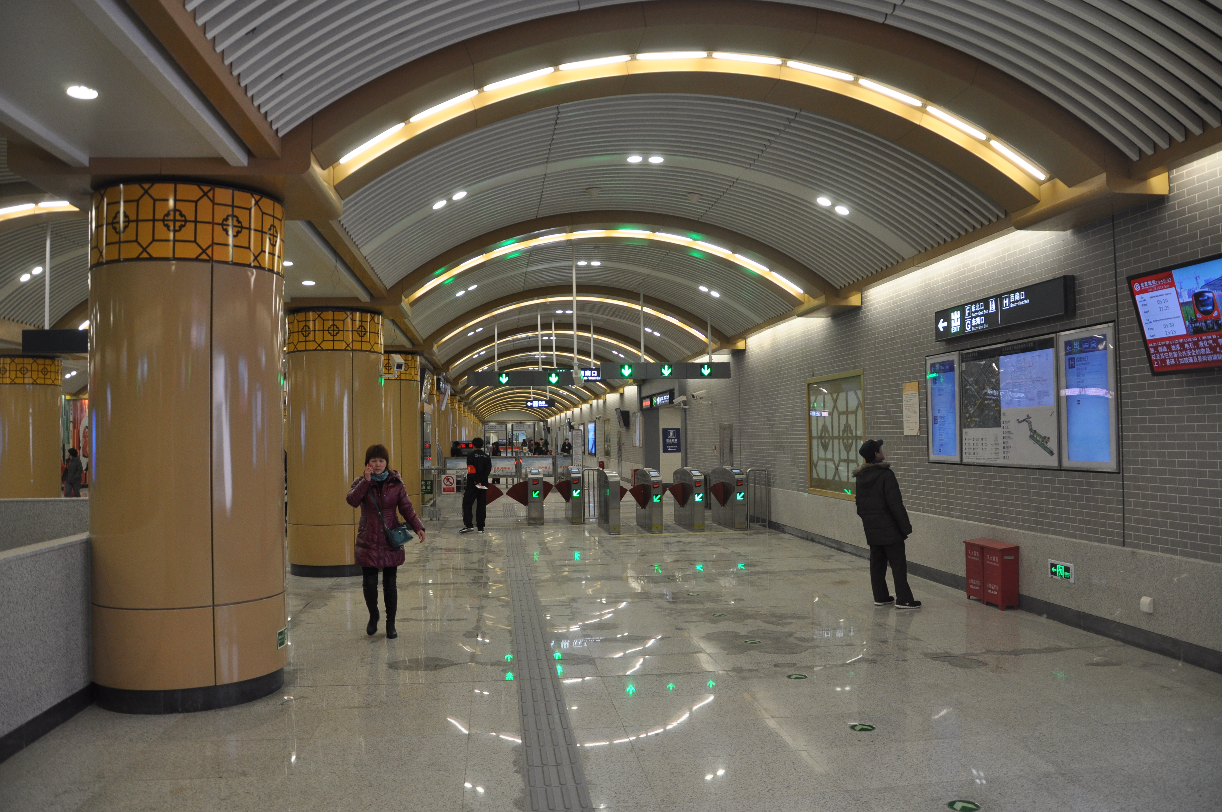 北京地铁7号线磁器口站站厅